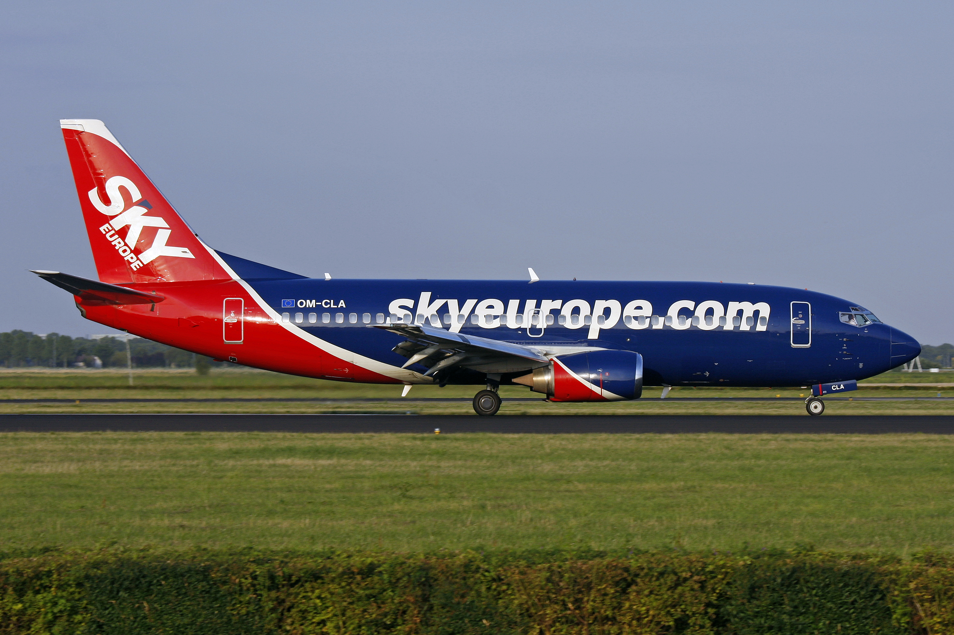 AMS 28-07-09